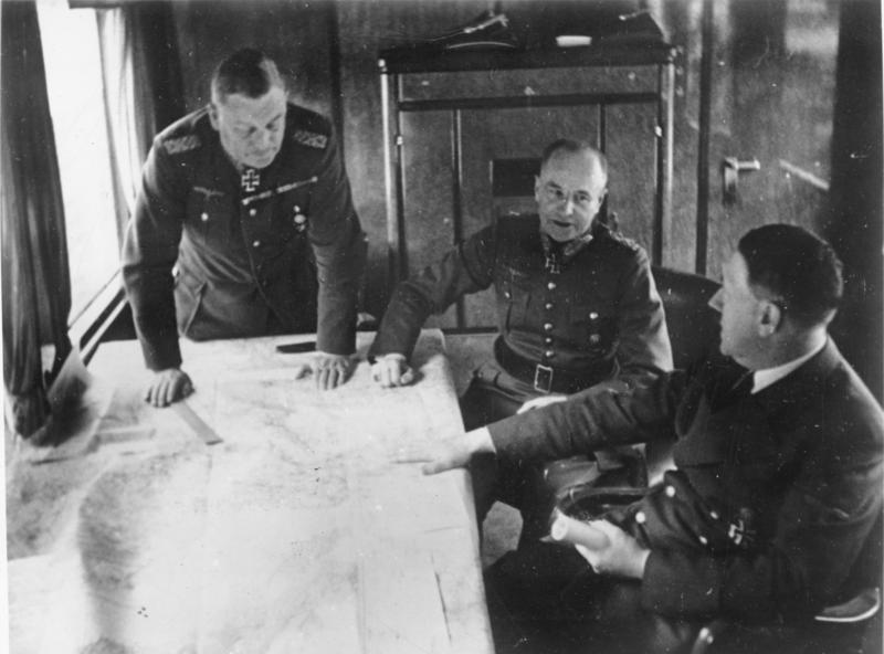 Hitler, von Brauchitsch, Keitel bei Besprechung Aus dem Führerhauptquartier. - Der Führer bespricht mit dem Oberbefehlshaber des Heeres, Generalfeldmarschall von Brauchitsch, und dem Chef des Oberkommandos der Wehrmacht, Generalfeldmarschall Keitel, die Operationen auf dem südöstlichen Kriegsschauplatz. PK-Aufnahme: Frentz April 1941 "Fr" OKW [Adolf Hitler, Walther von Brauchitsch und Wilhelm Keitel vor einer Karte bei Besprechung in einem Eisenbahnwagen des Führerhauptquartiers] Abgebildete Personen: Brauchitsch, Walther von: Generalfeldmarschall, Oberbefehlshaber des Heeres, Deutschland (GND 116414855) Hitler, Adolf: Reichskanzler, Deutschland Keitel, Wilhelm: Generalfeldmarschall, Ritterkreuz (RK), Heer, Deutschland (GND 118721577)